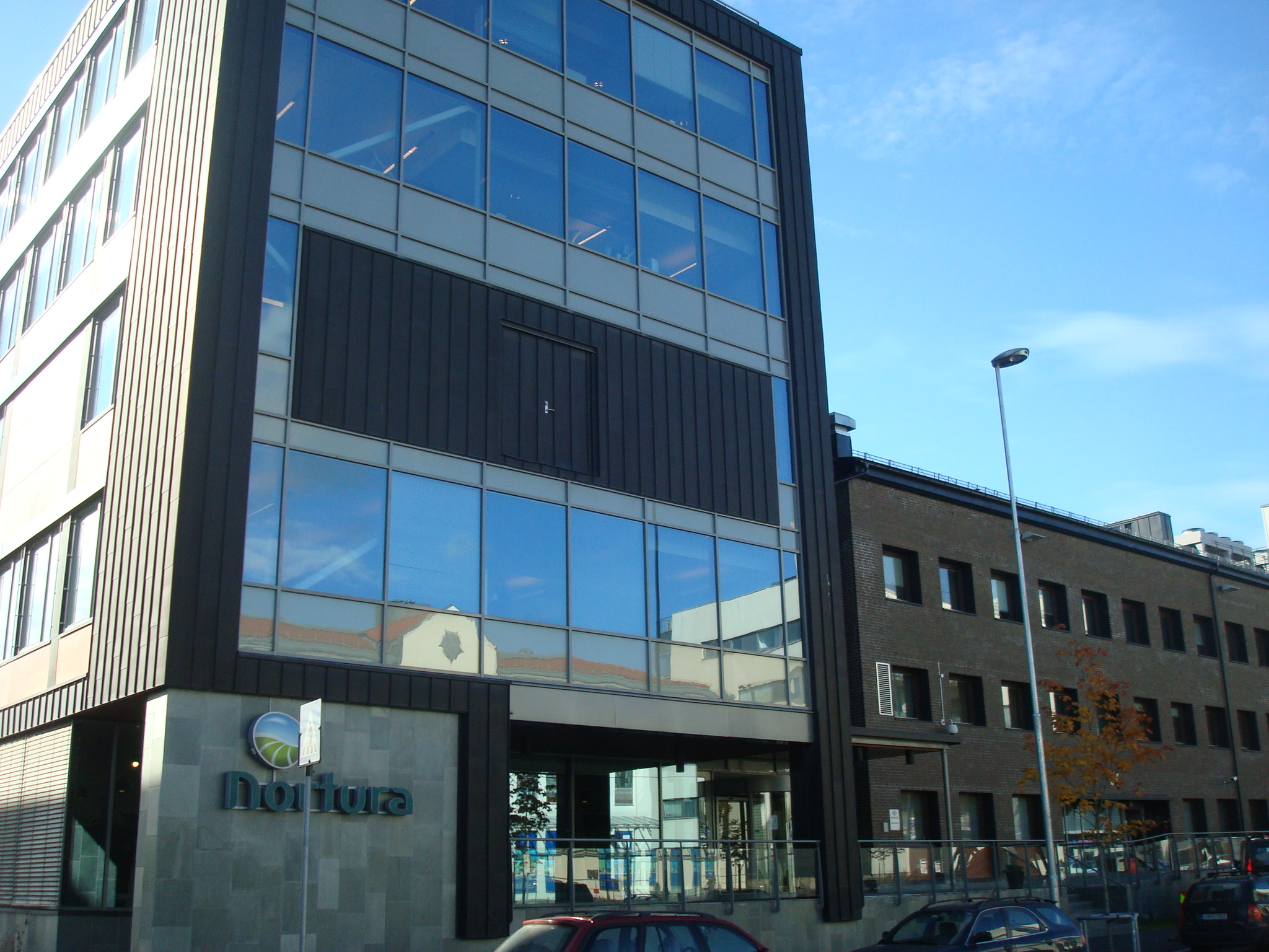 Lørenveien 37 i Oslo